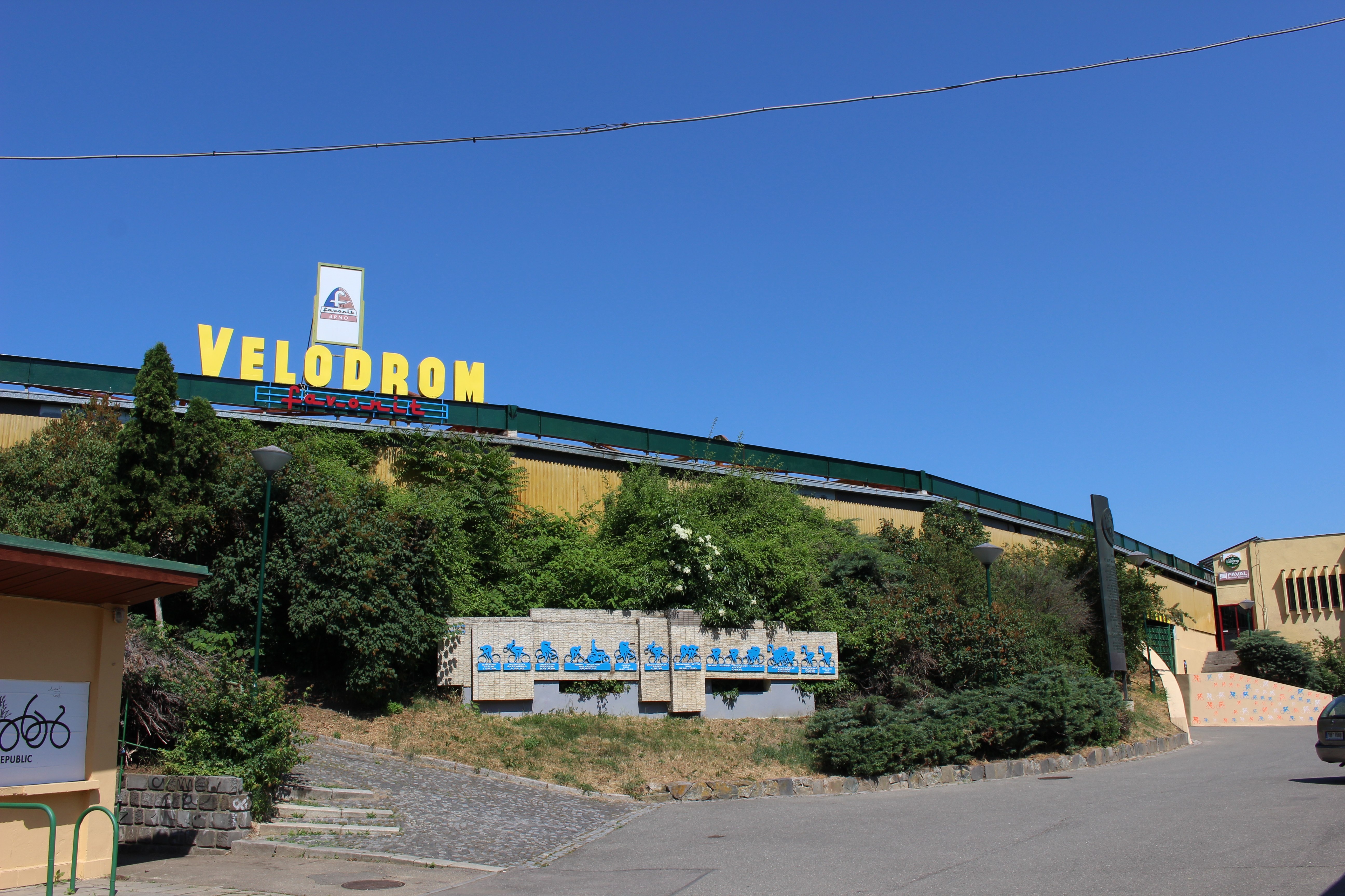 Velodrom Favorit Brno, Křížkovského 22/416, Brno-střed, okres Brno-město, Jihomoravský kraj